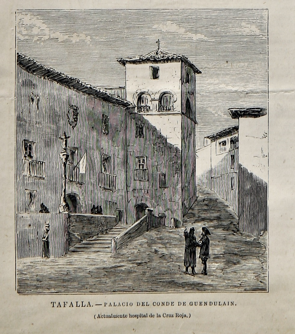 Grabado del Palacio de los Mencos en 1875, en esos momentos primer hospital de la Humanitaria (futura Cruz Roja) en España.